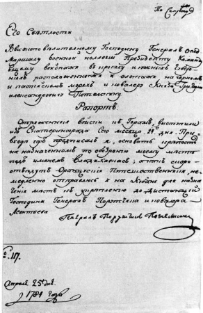 Рапорт №117 Генерал-Поручика П.С Потемкина Генерал-Фельдмаршалу князю Г.А. Потемкину о закладке крепости Владикавказ.